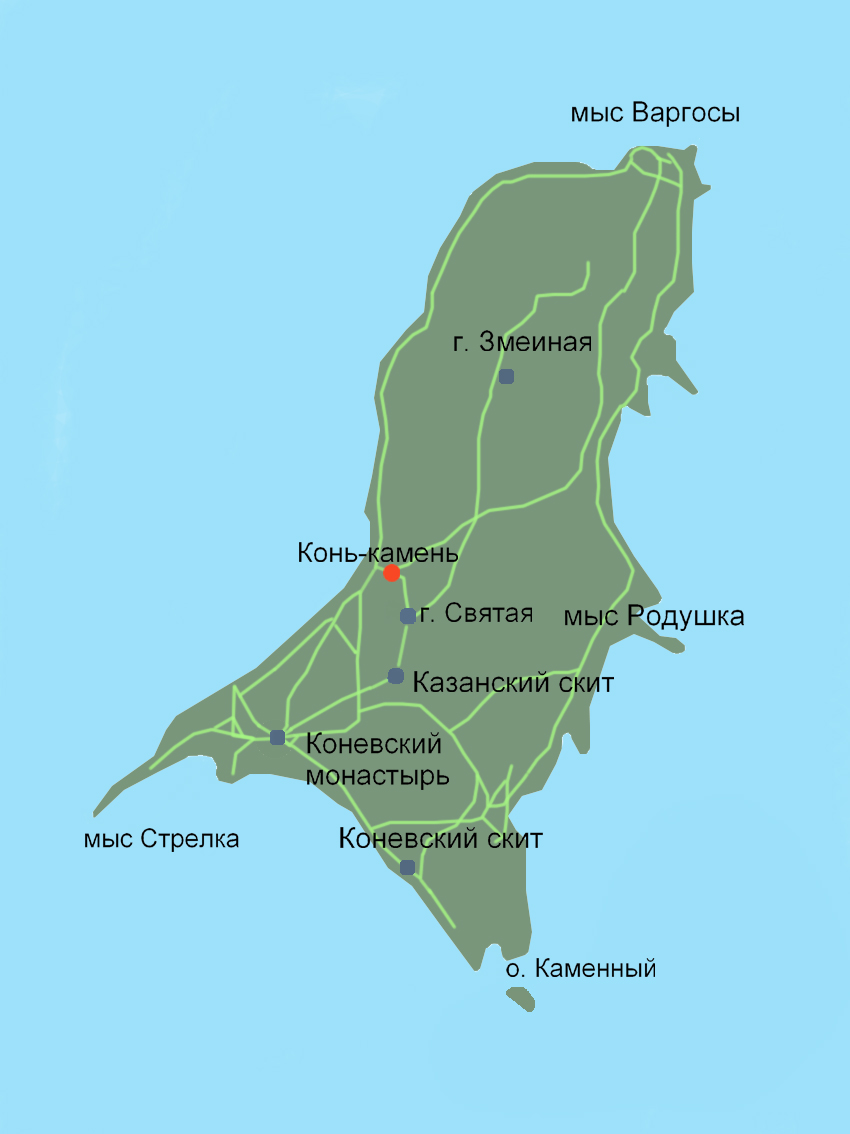 План острова Коневец. Ладожское озеро